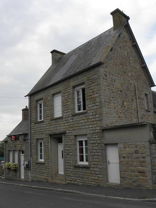 Mairie des Pas, commune associée à celle Pontorson (50) depuis le 1er janvier 1973.